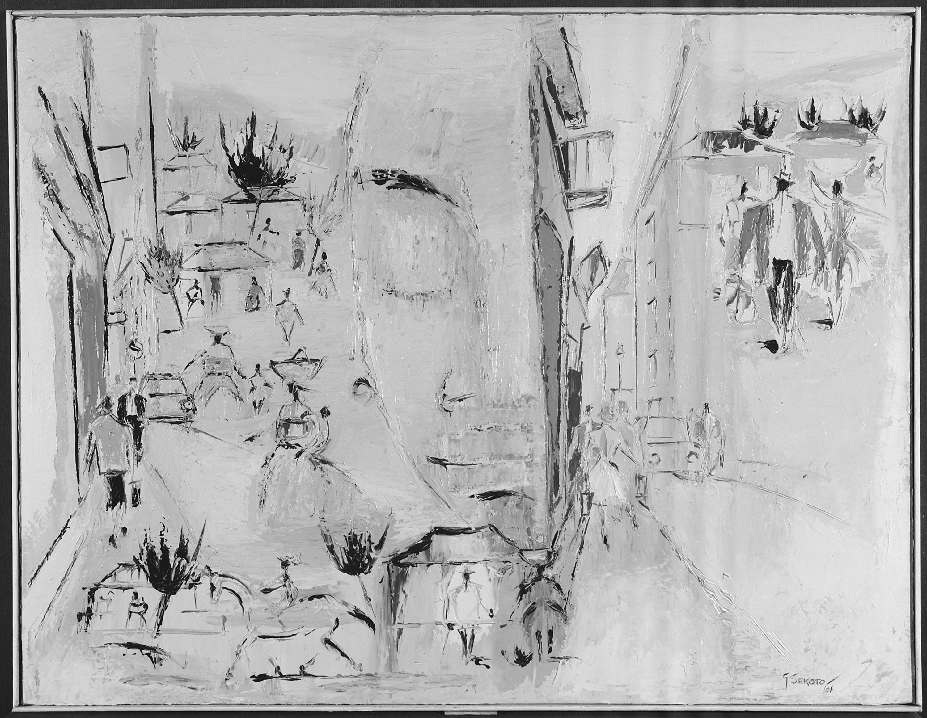 General notes: Oil